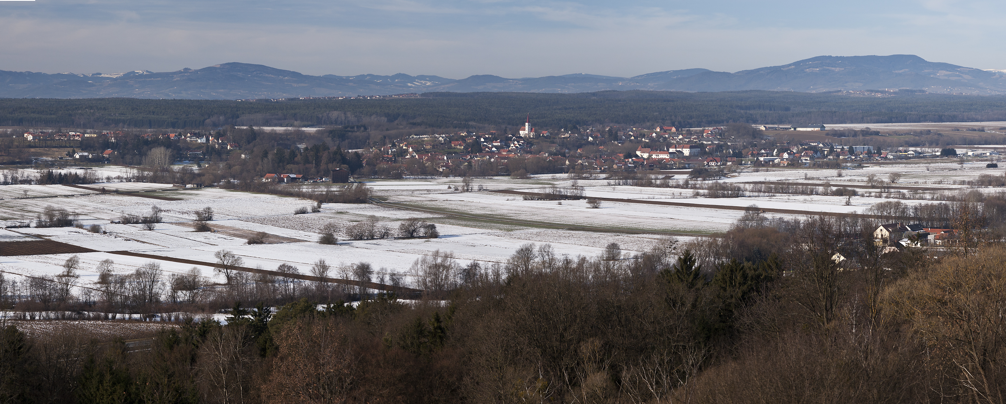 Burgau von Südost